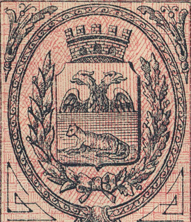 Беларуская (тарашкевіца): Герб Гомеля ўзору 1917-1918 гг.